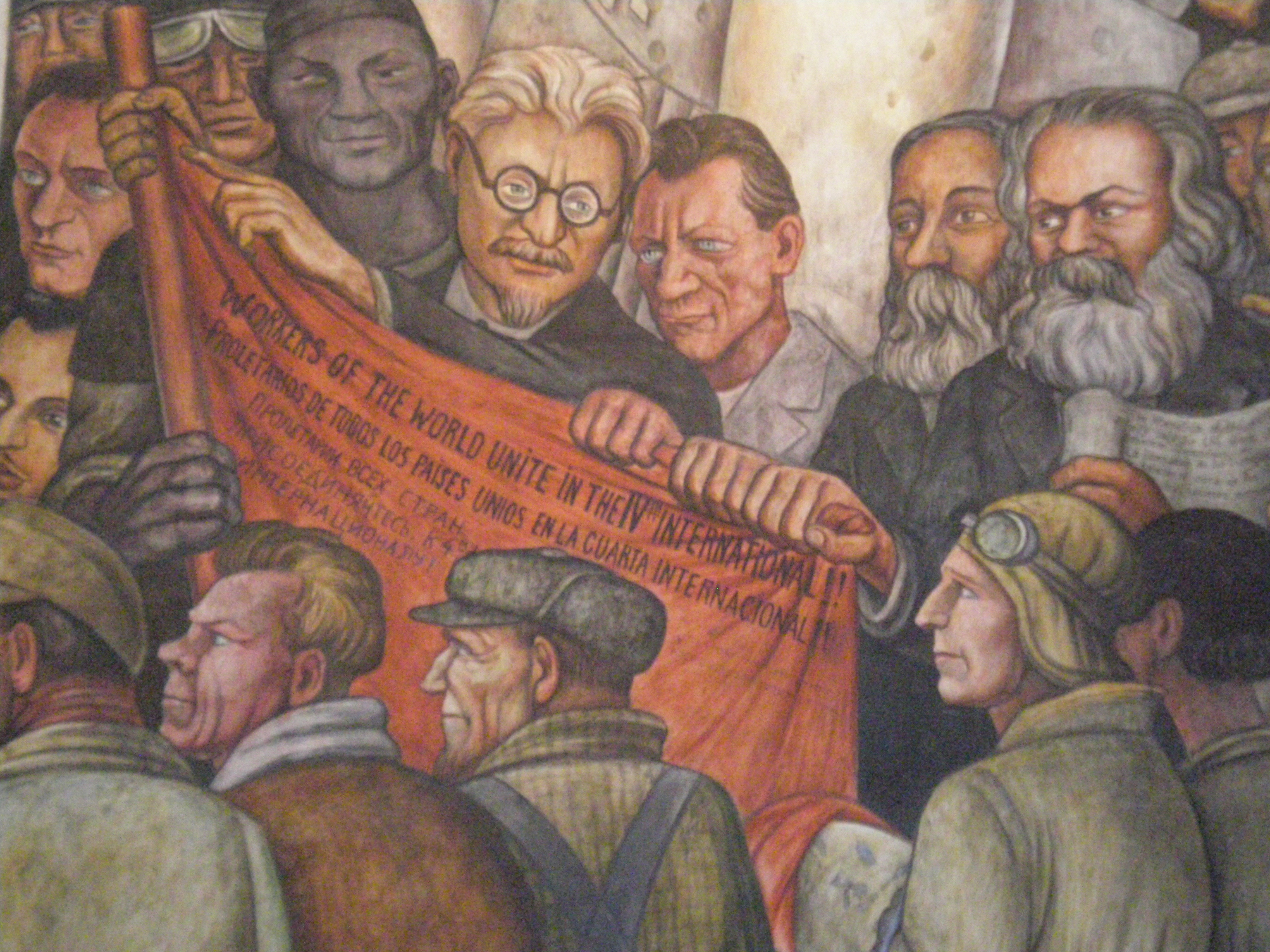 Détail de la fresque de Diego Rivera « Man at the Crossroads » au palais des Beaux-Arts, à Mexico. Y sont notamment représentés Léon Trotski, tenant le drapeau rouge de la Quatrième Internationale, Friedrich Engels et Karl Marx (passer le curseur de la souris sur l'image pour les identifier).